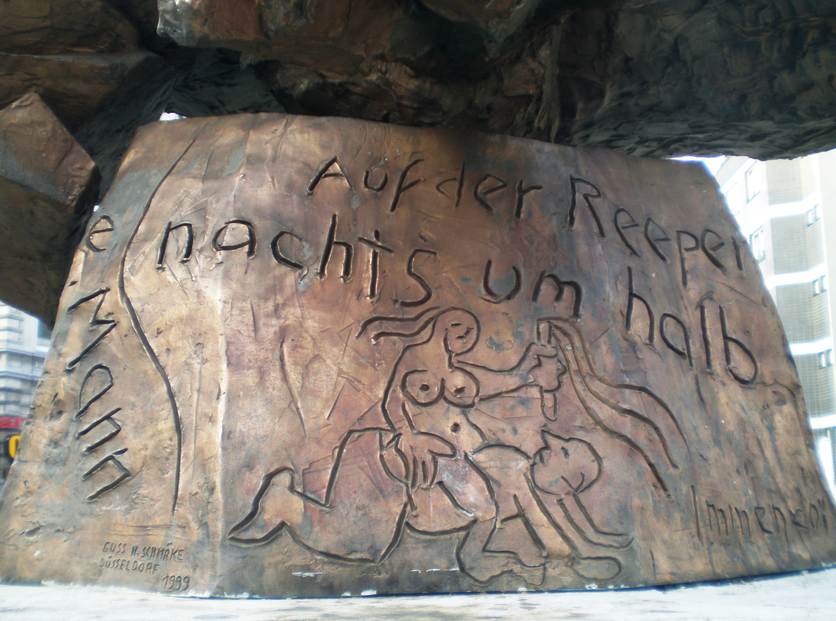 Jörg Immendorff 1986, Hans- Albers-Denkmal (Hans Albers Memorial), Hamburg, Germany